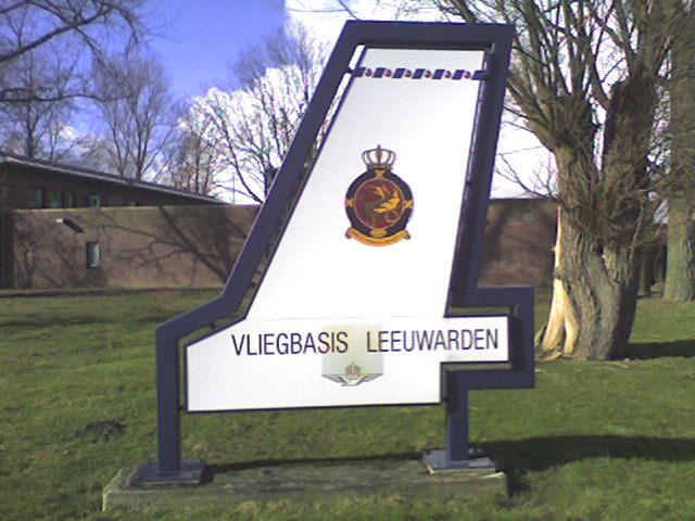 Bord aan de toegangsweg van de vliegbasis Leeuwarden. Eigen werk maart 2006 Roadsign indicating airbase Leeuwarden. Own work march 2006